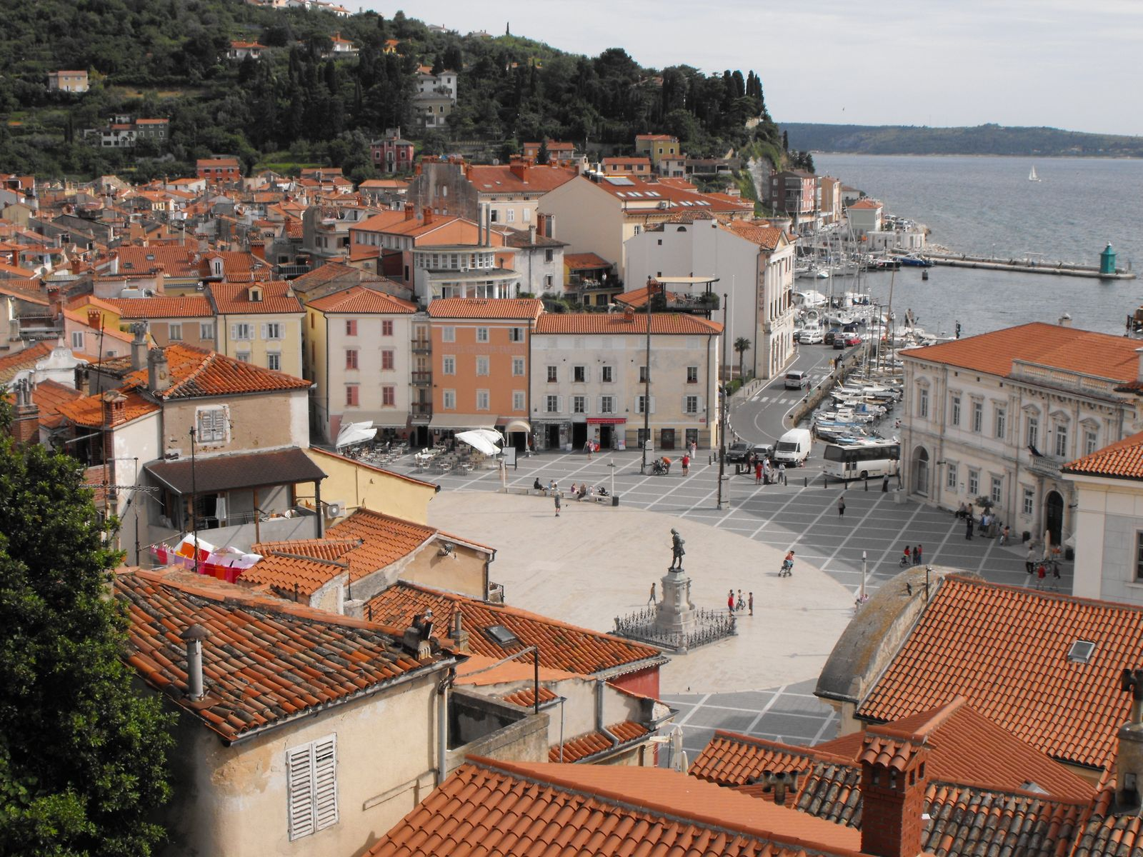 Piran